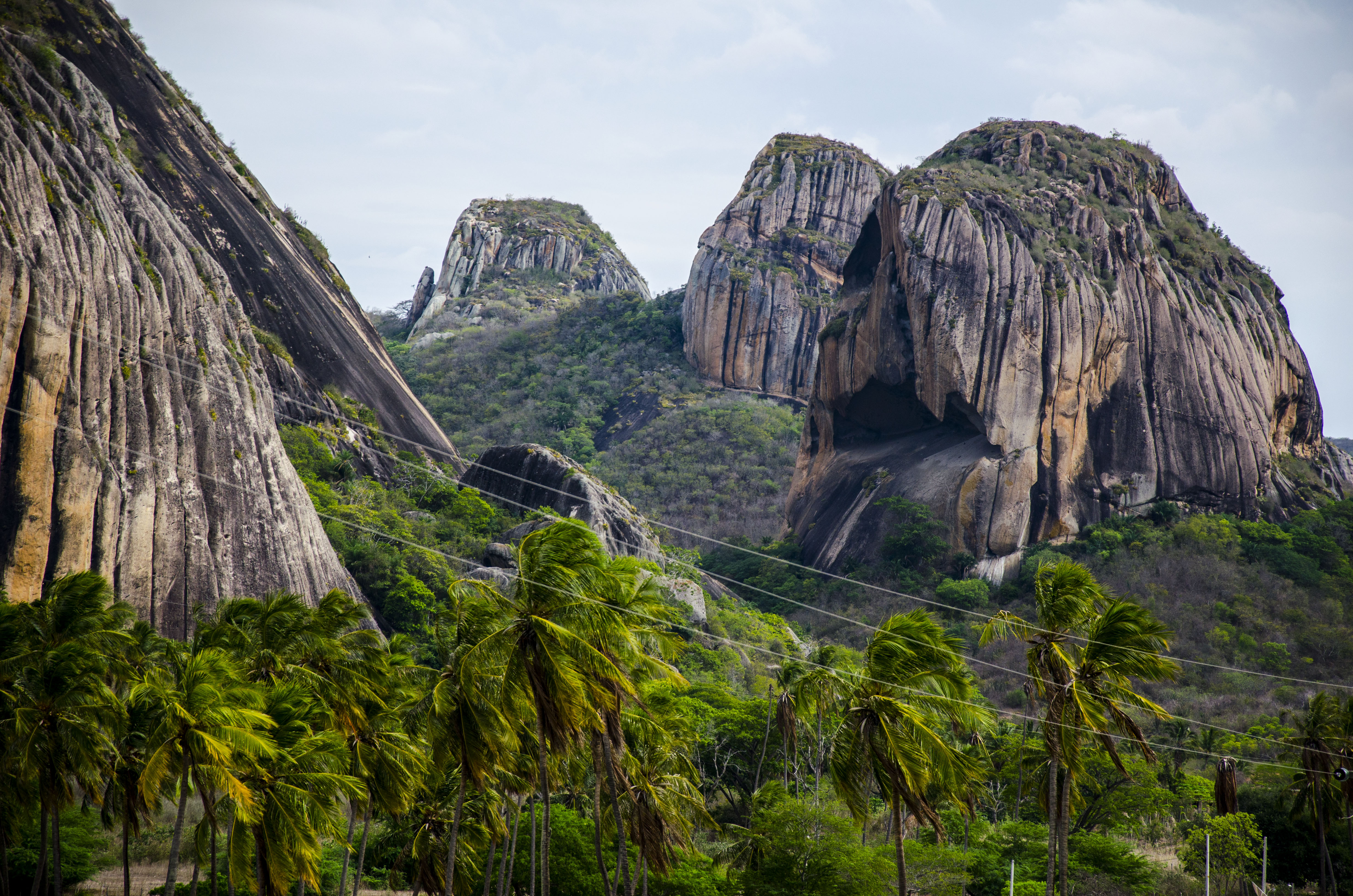 O Parque Estadual da Pedra da Boca fica localizado na divisa entre o estado da Paraíba e do Rio Grande do Norte. Lugar lindo e cheio de natureza.